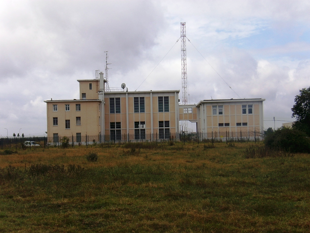 Vue du bâtiment de TDF et de l'antenne relais numéro 1 de VIllebon-sur-Yvette (91)